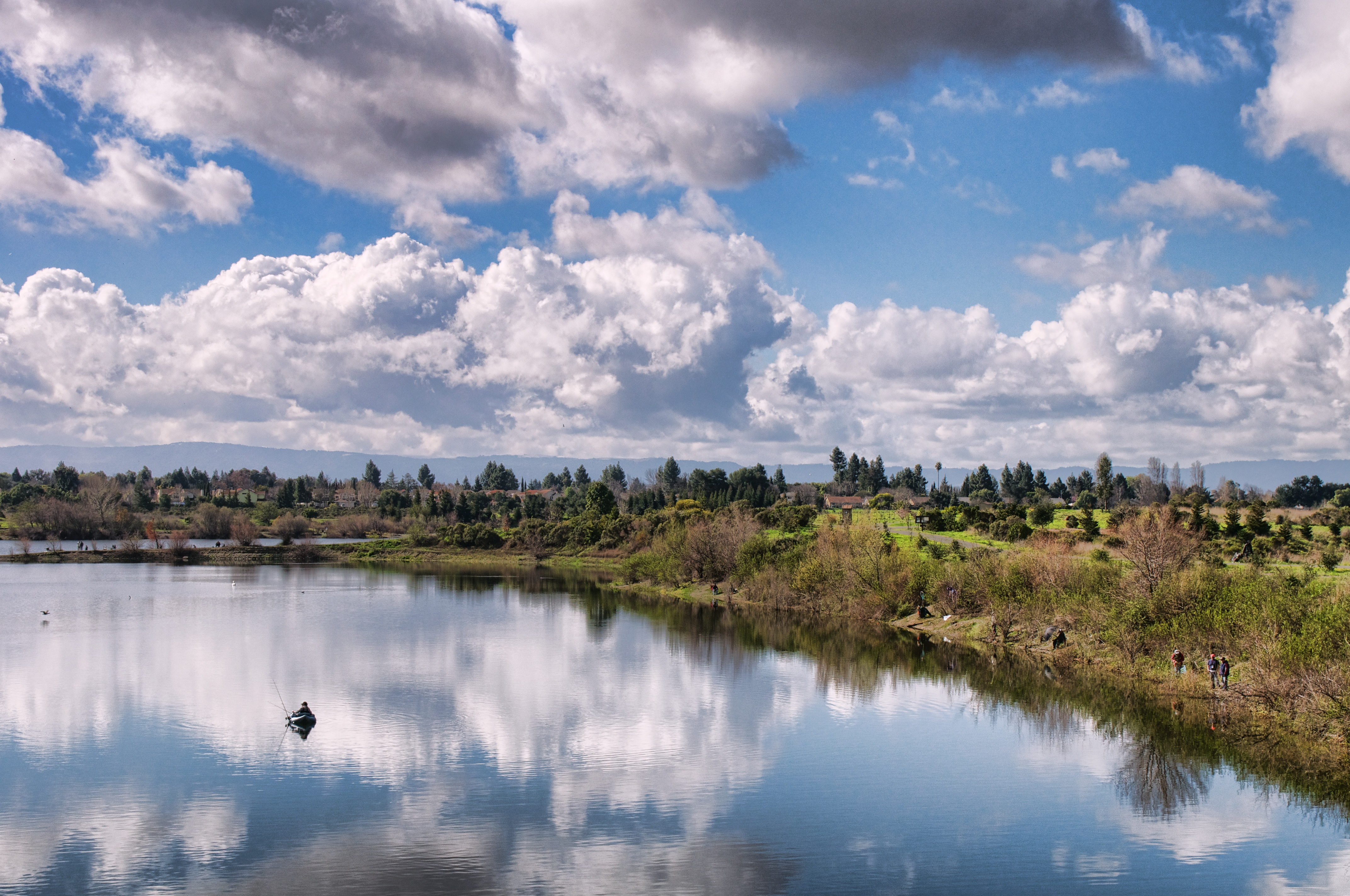 Clouds over Horseshoe Lake